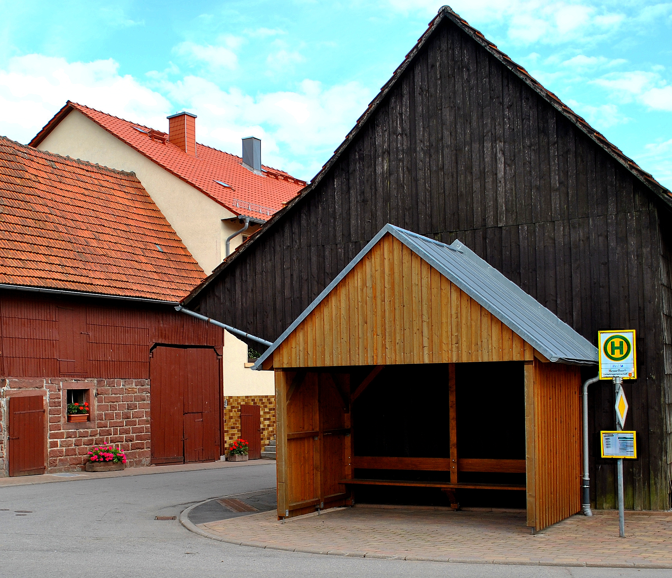 Bushaltestelle (sog. Ruftaxi) im Dorfzentrum von Hesselbach an der Kreuzung der Hauptstraße mit der Oberdorfstraße und der Unterdorfstraße